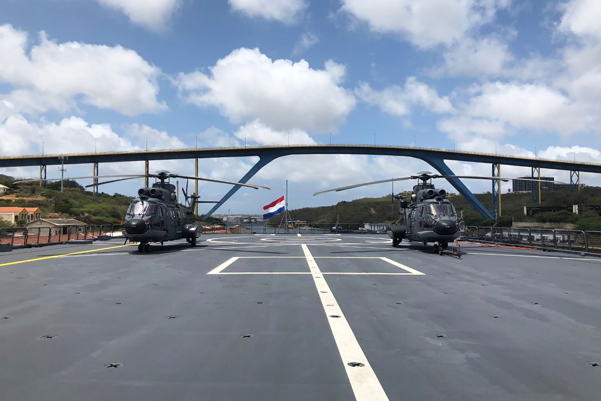 Het cougardetachement van 300 Squadron vaart met Zr.Ms. Karel Doorman mee in het Caribisch gebied. Het schip werd ingezet om mensen en materieel in te zetten in het kader van de coronacrisis, maar eenmaal aangekomen bleek de situatie mee te vallen. Daarom helpt het schip Zr.Ms. Zeeland met onder meer maritieme grensbewaking. De vlieg-crew draagt met 2 Cougars haar steentje bij en gebruikt de tijd om intensief personeel te trainen.